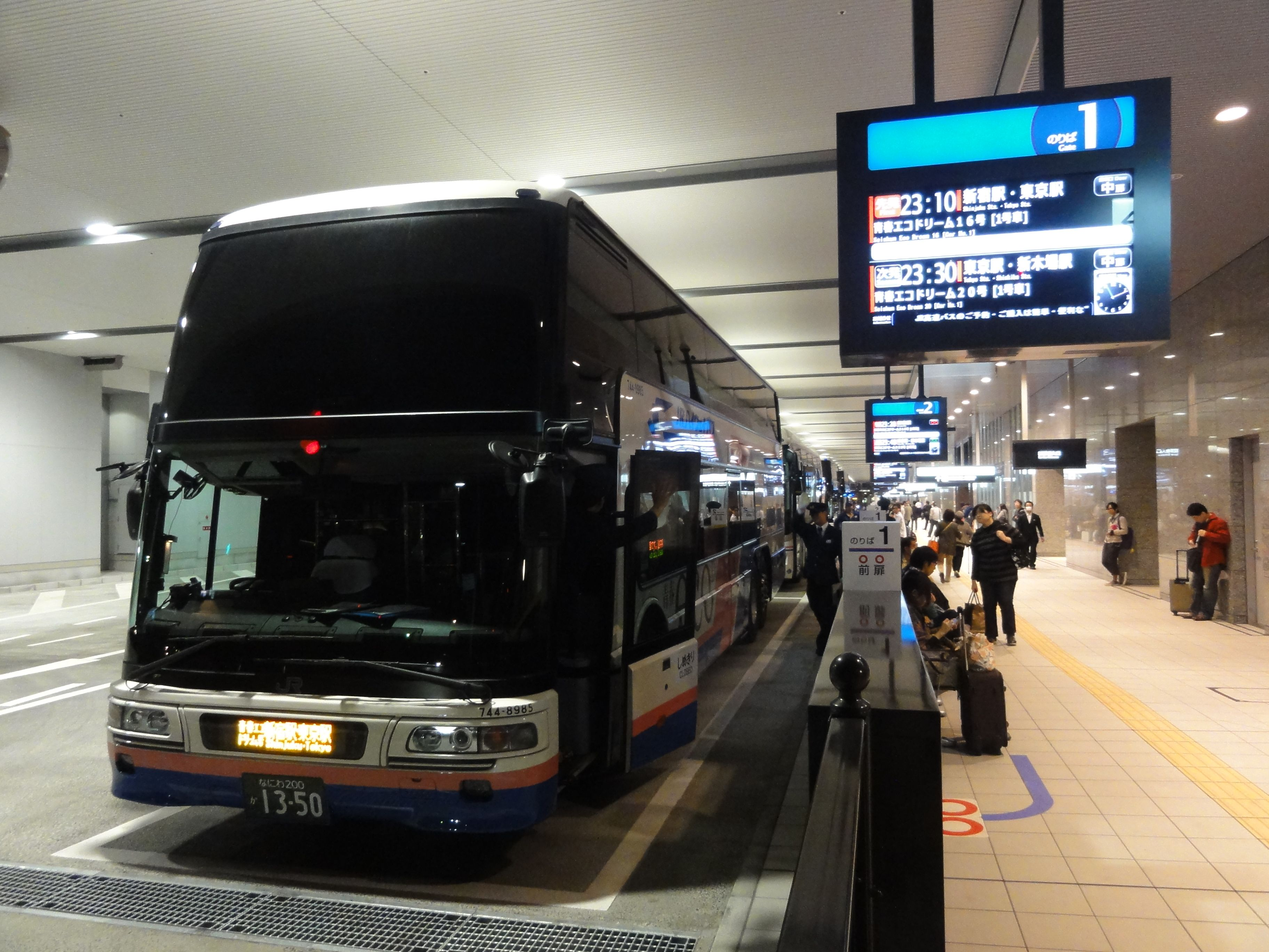 西日本ジェイアールバス大阪駅高速バス乗り場